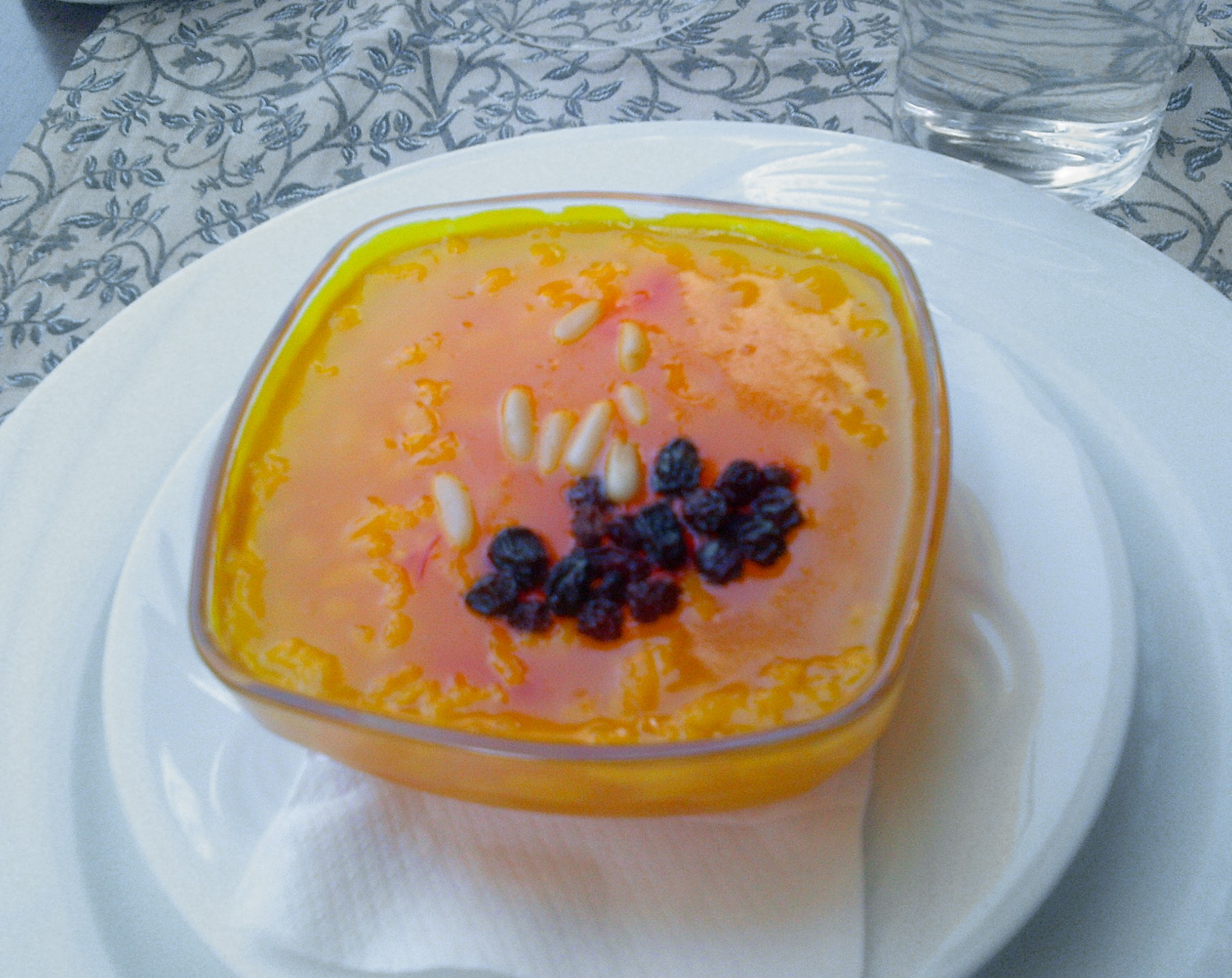 Zerde, un postre turco tradicional que es colorado por su ingrediente de azafran.